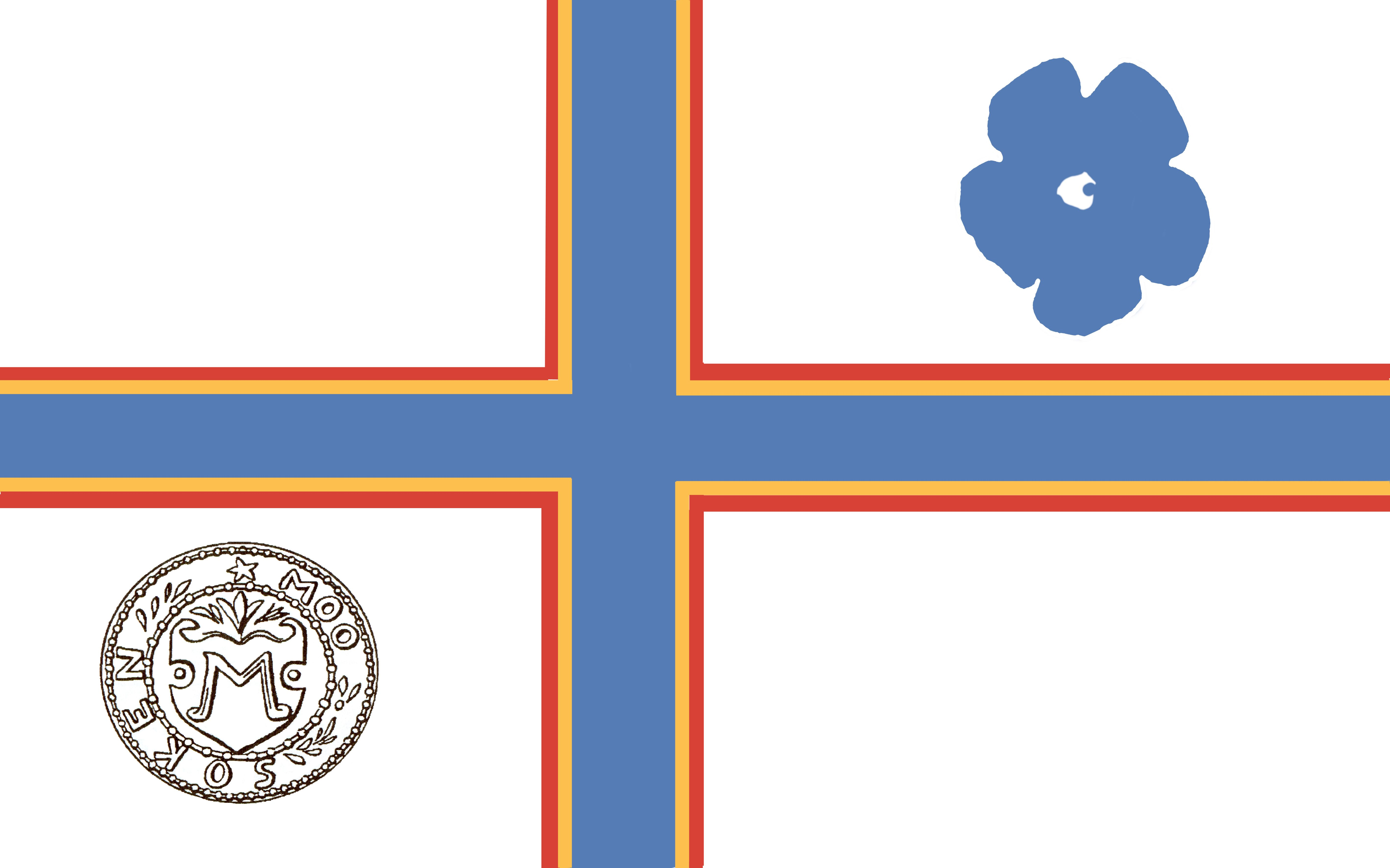 Moflaggan är en symbolflagga för Mo Socken i Söderhamns kommun och avtäcktes i september 2008.